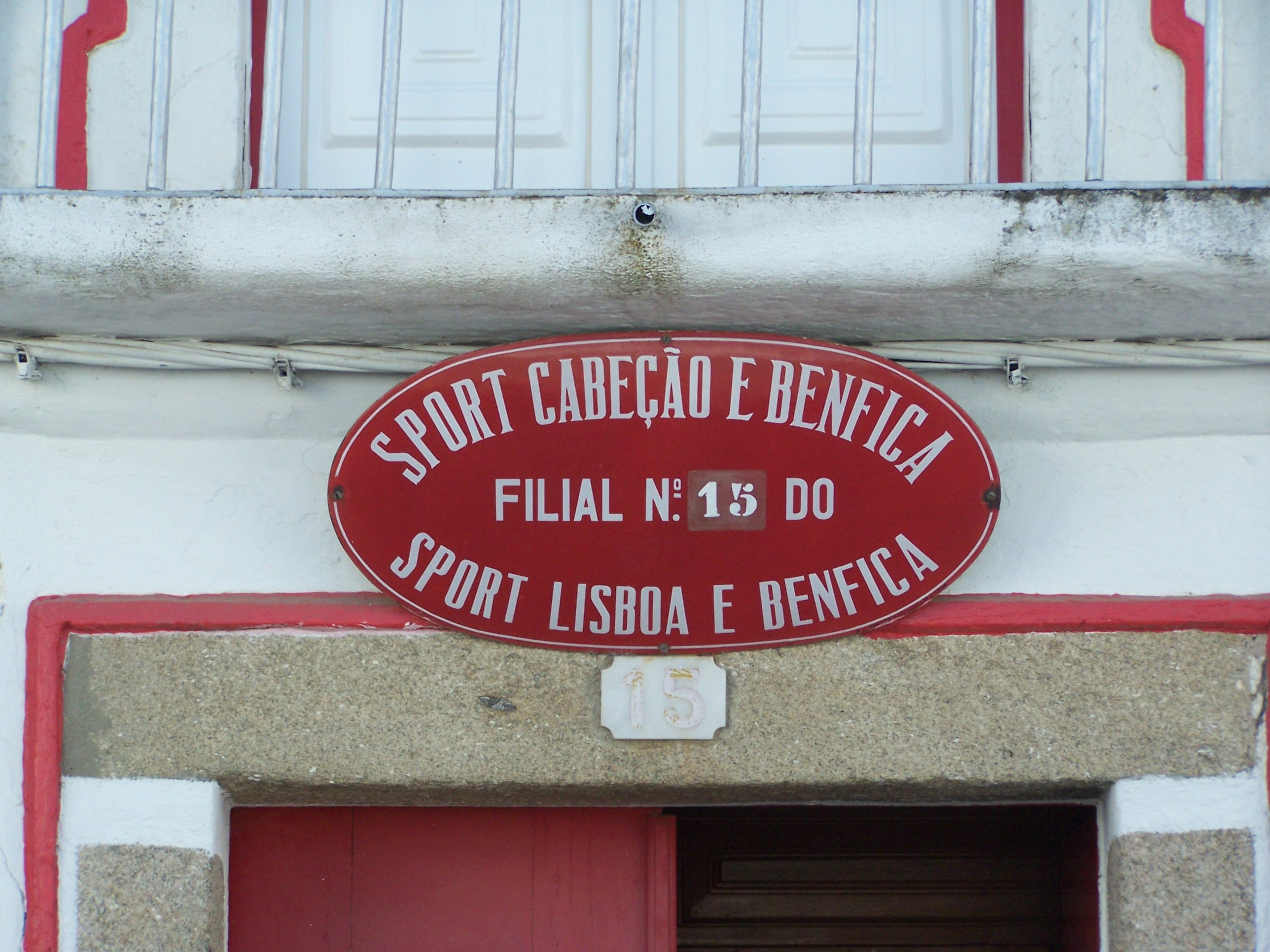 Cabeção- Sede do Sport Cabeção e Benfica IV